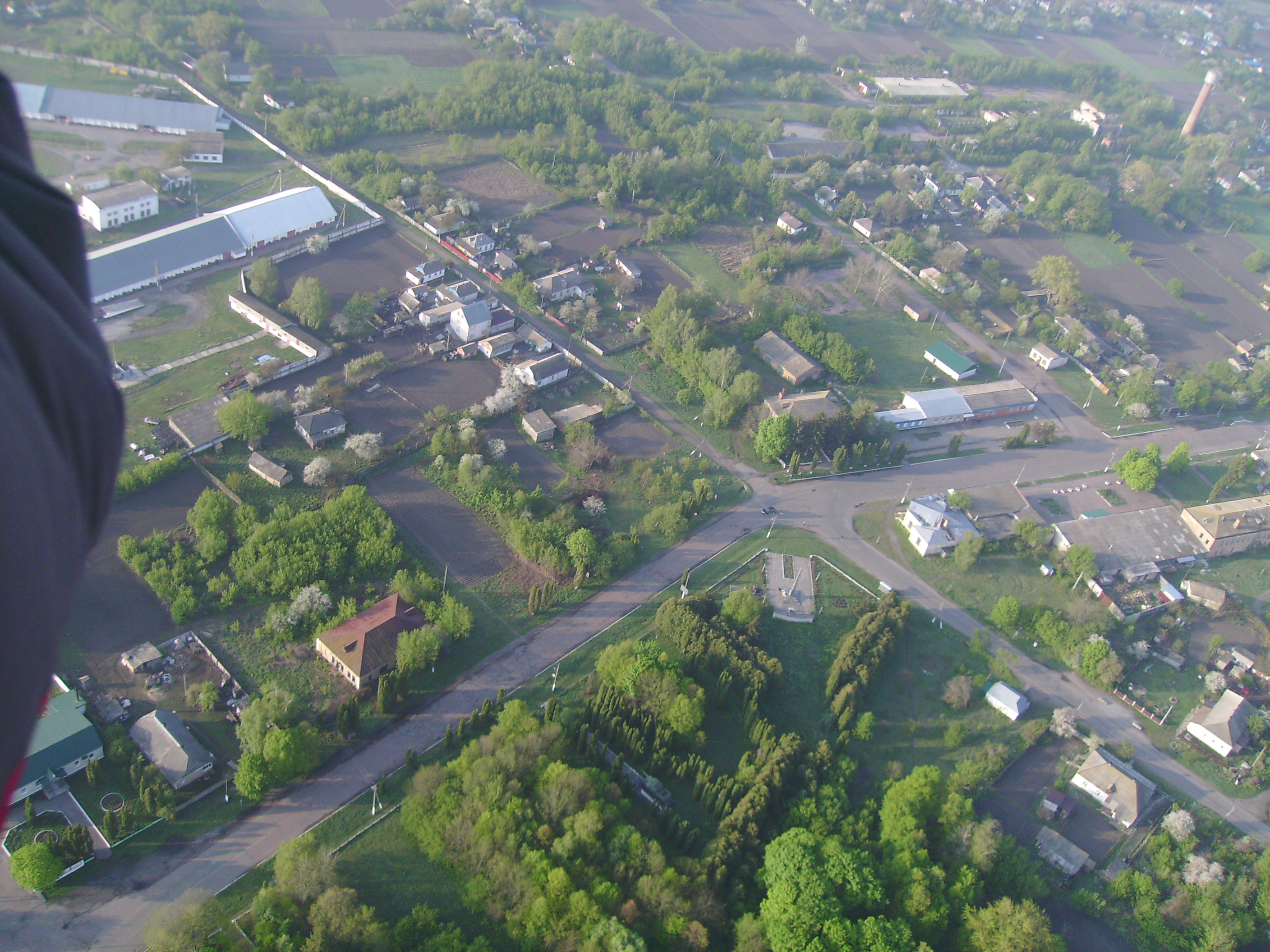 Центр села Дмитрівка (пошта, обеліск, магазини), 05.05.2020 р. фото з мотодельтаплану, Балашов С.